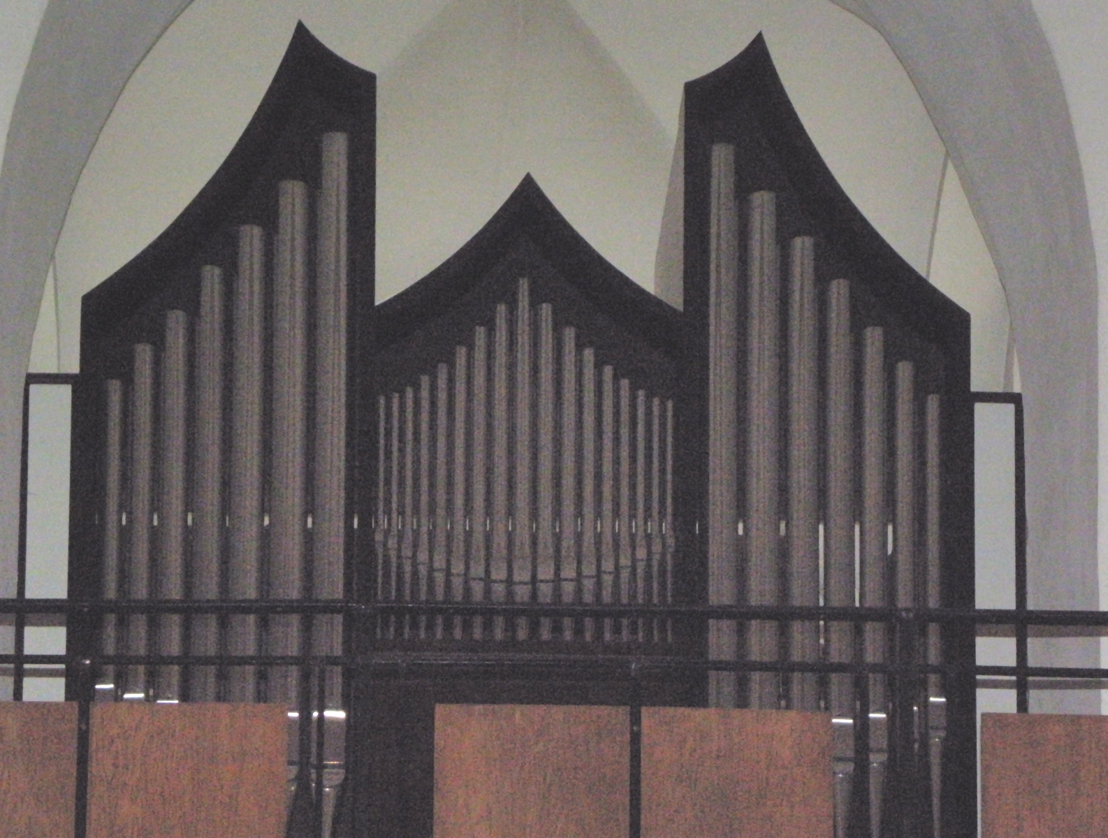 Kath. Kirche St. Peter und Paul in Eberswalde, Orgel